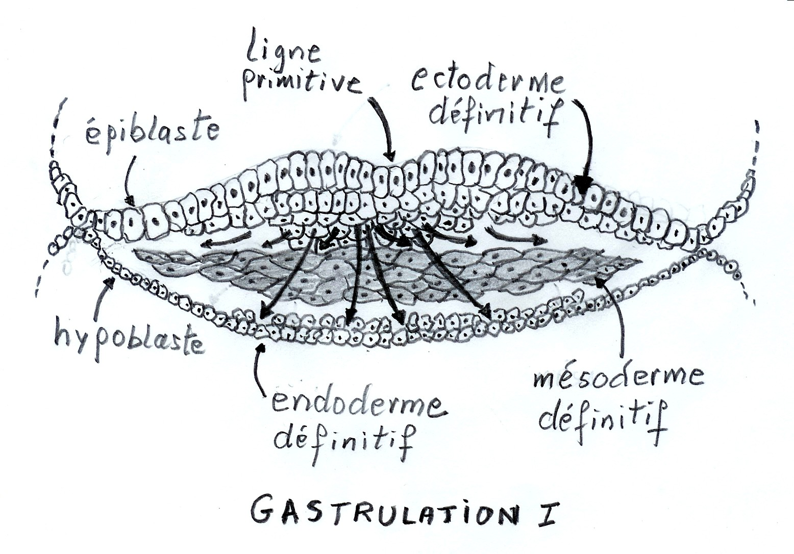 Description: Embryon--Gastrulation. Différentiation des cellules épiblastiques en ectoderme, mésoderme et endoderme définitifs Source: Dessin original. Auteur: Michel Hamels. Cette image est: librement diffusable à titre commercial ou non librement modifiable et l'image modifiée est elle-même librement modifiable et diffusable à titre commercial ou non. Michel Hamels 28 mars 2006 à 21:47 (CEST)